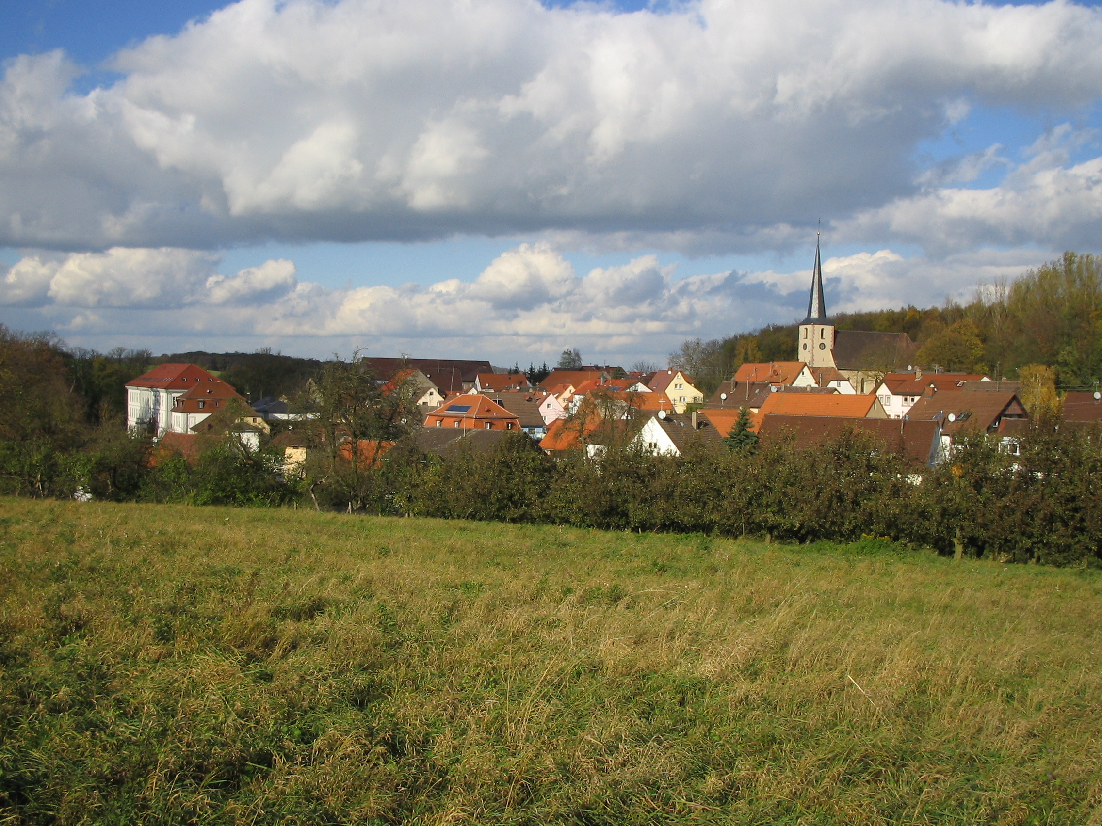 Blick auf Messelhausen